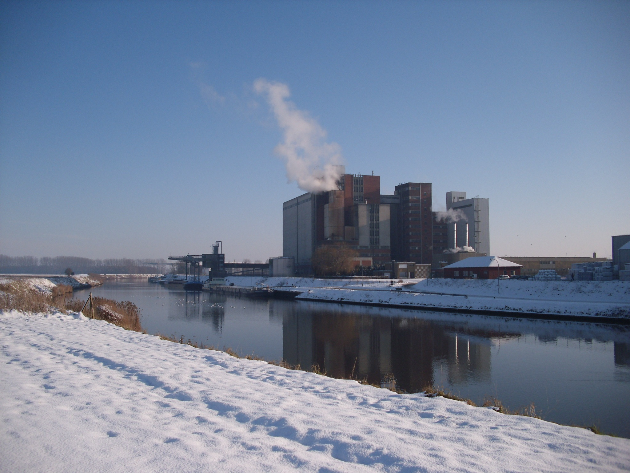 Aveve-vestiging langs kanaal Gent-Brugge-Oostende - Venecolaan 22 - Aalter - Oost-Vlaanderen - Vlaanderen - België